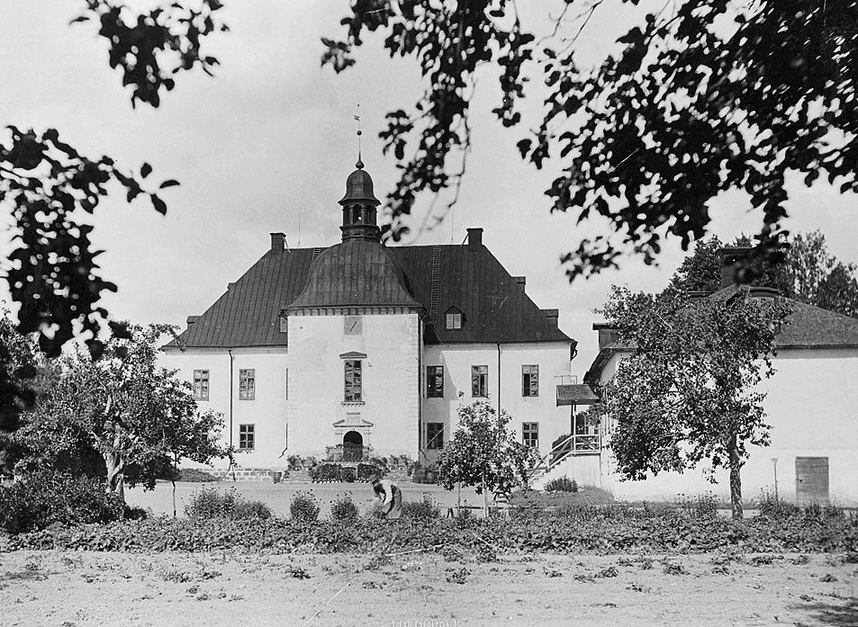 Gardener outside Årsta Castle south of Stockholm. Built in about 1650, but originating in the 14th century. Trädgårdsmästare utanför Årsta slott söder om Stockholm. Byggt omkring 1650, men med anor från 1300-talet. Parish (socken): Österhaninge Province (landskap): Södermanland Municipality (kommun): Stockholm County (län): Stockholm Photograph by: Carl Curman Date: 1896 Format: Albumen print Persistent URL: Read more about the photo database (in english)